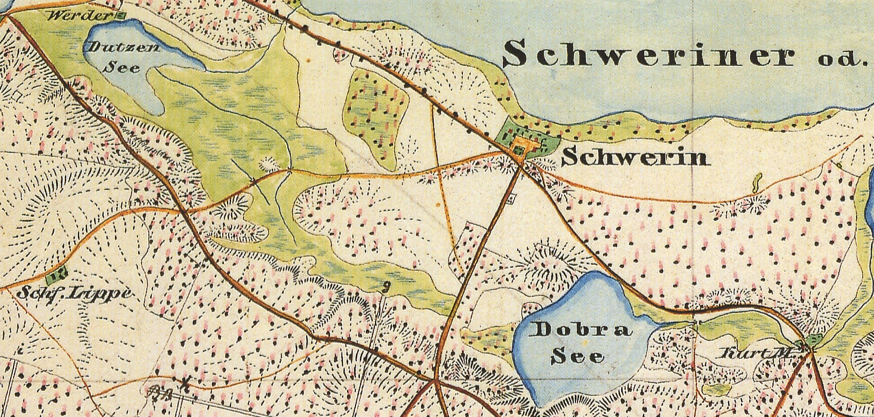 Schwerin, Ortsteil der Stadt Storkow (Mark), Lkr. Oder-Spree, Brandenburg, Deutschland, Ausschnitt aus dem Urmesstischblatt 3849 Alt-Schadow von 1846